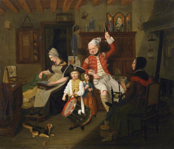 Der Aschermittwoch.